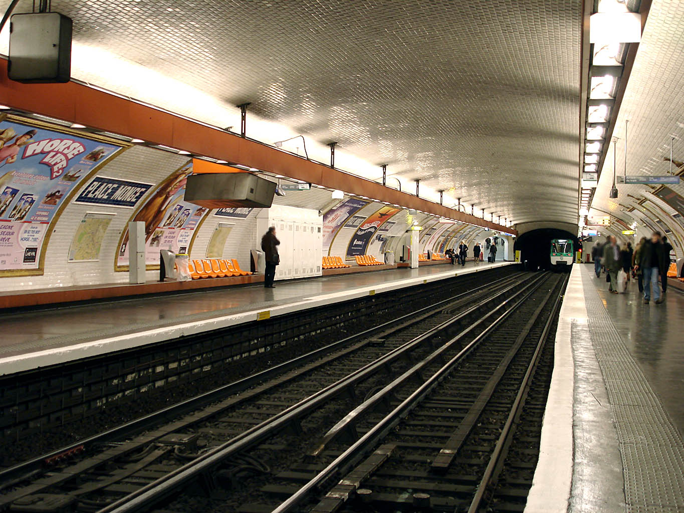 Station Place Monge, de la ligne 7 du métro de Paris, France.